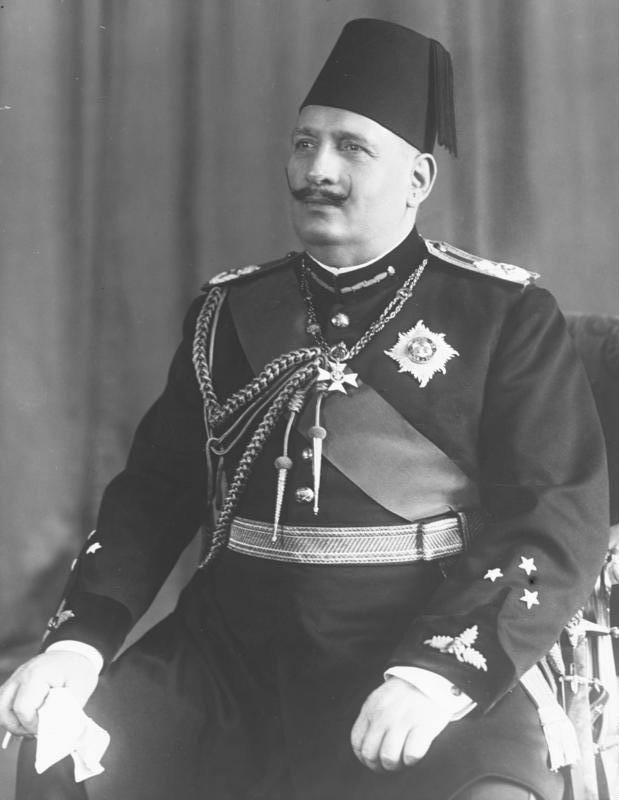 König Fuad von Aegypten! Porträt des aegyptischen Königs Fuad.